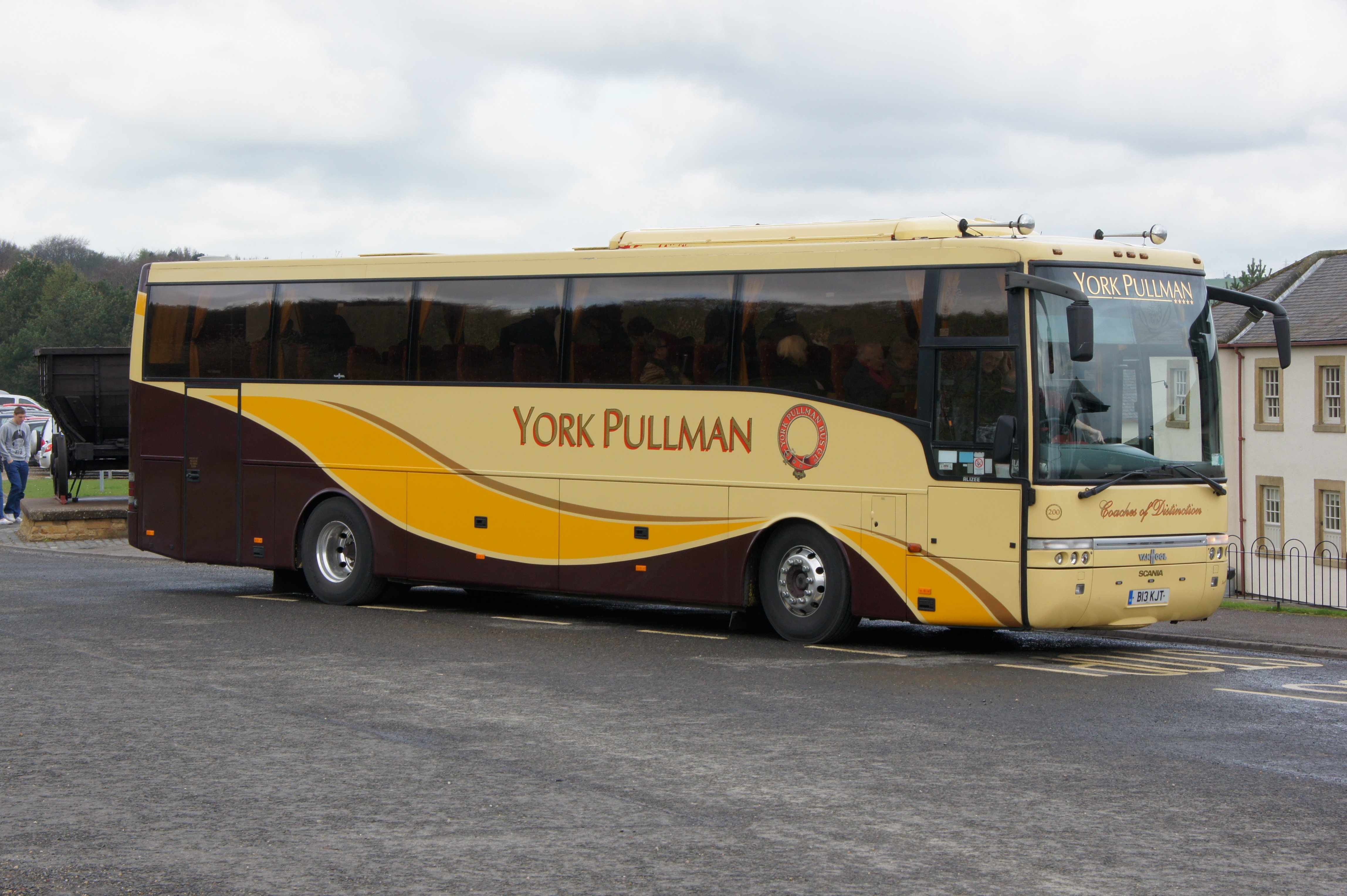 B13KJT 110412 CPS